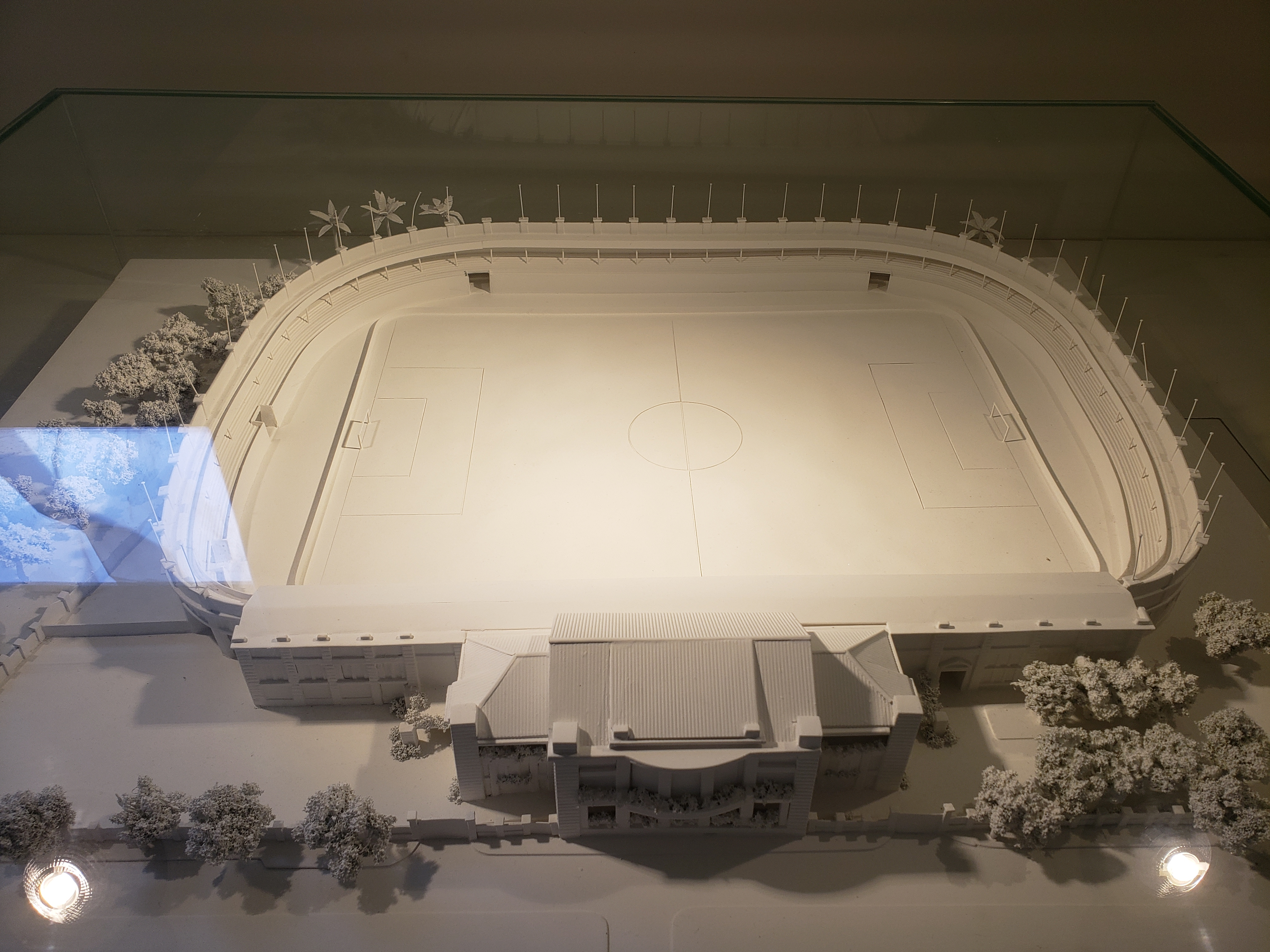 Maquete do Estádio de Laranjeiras em exposição na Sala de Troféus do Fluminense.